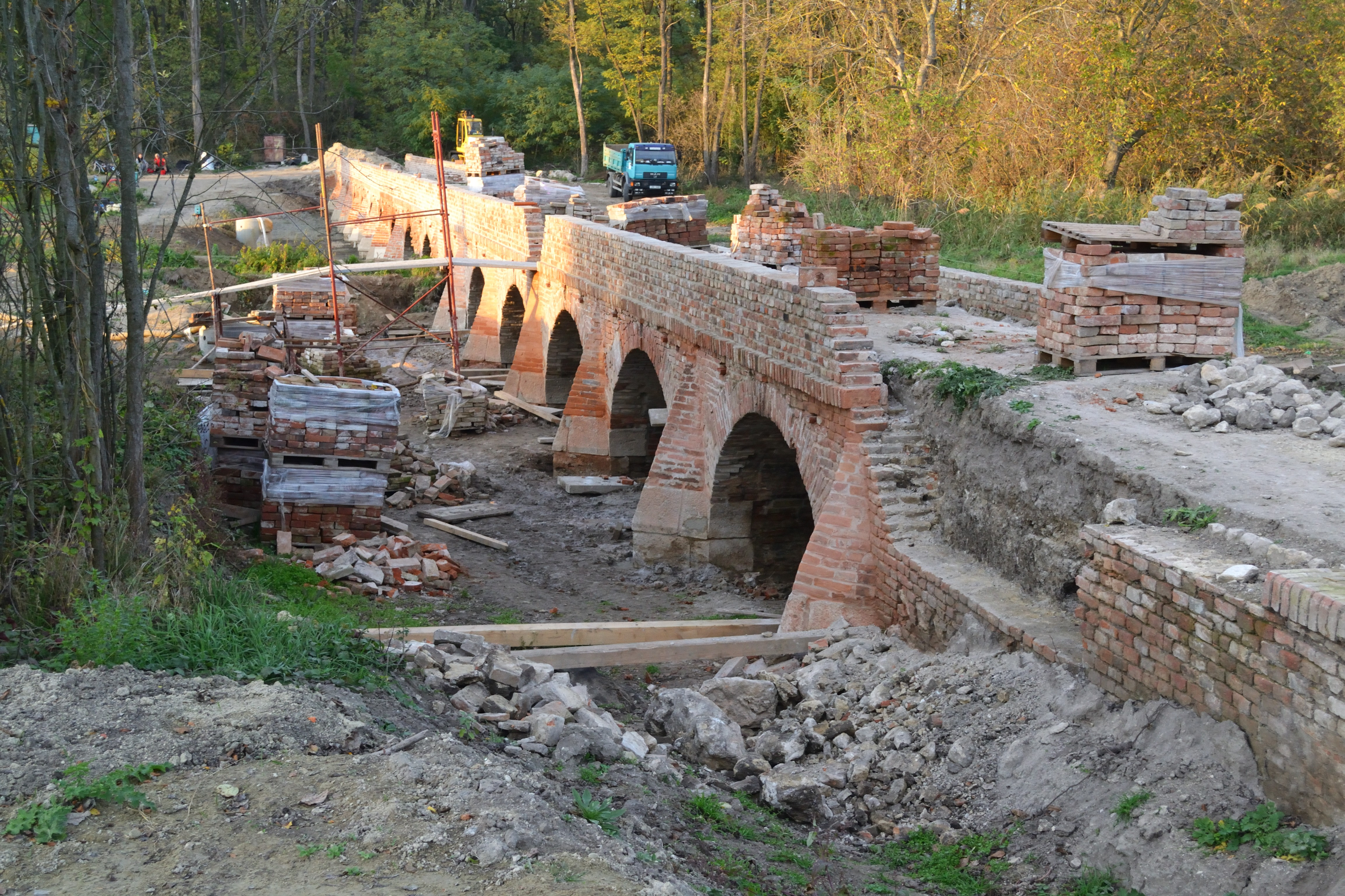 Mikulov - cihlový most u letohrádku Portz, rekonstrukce